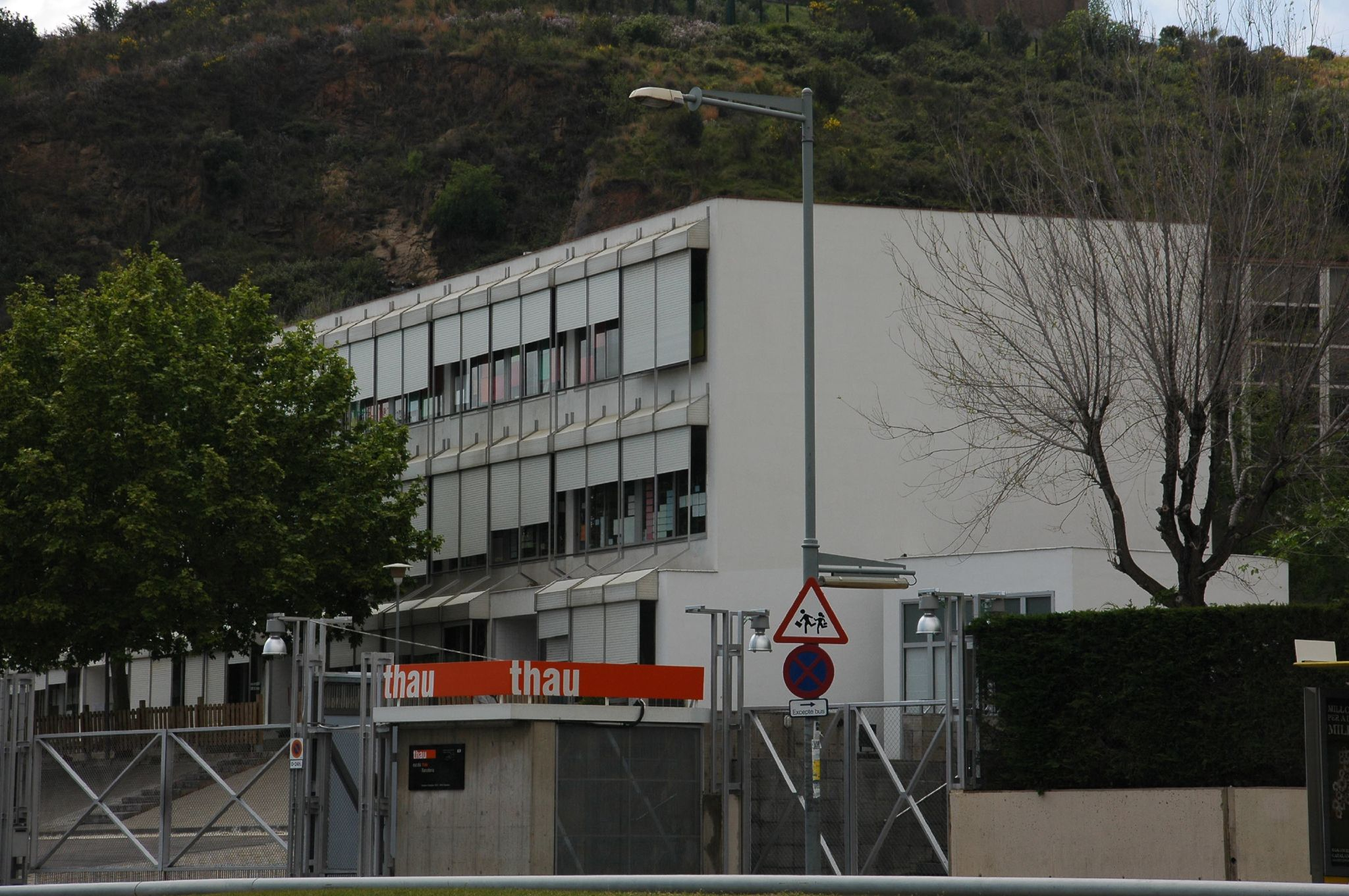 Escola Thau. Arquitecte: Oriol Bohigas (1975). Avinguda d'Esplugues, 49-53